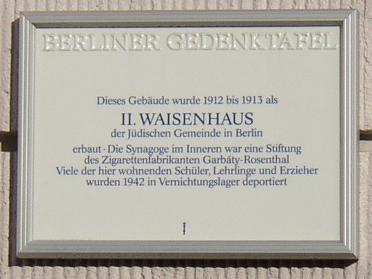 Berliner Gedenktafel für das ehem. jüd. Waisenhaus in Berlin-Pankow, Deutschland